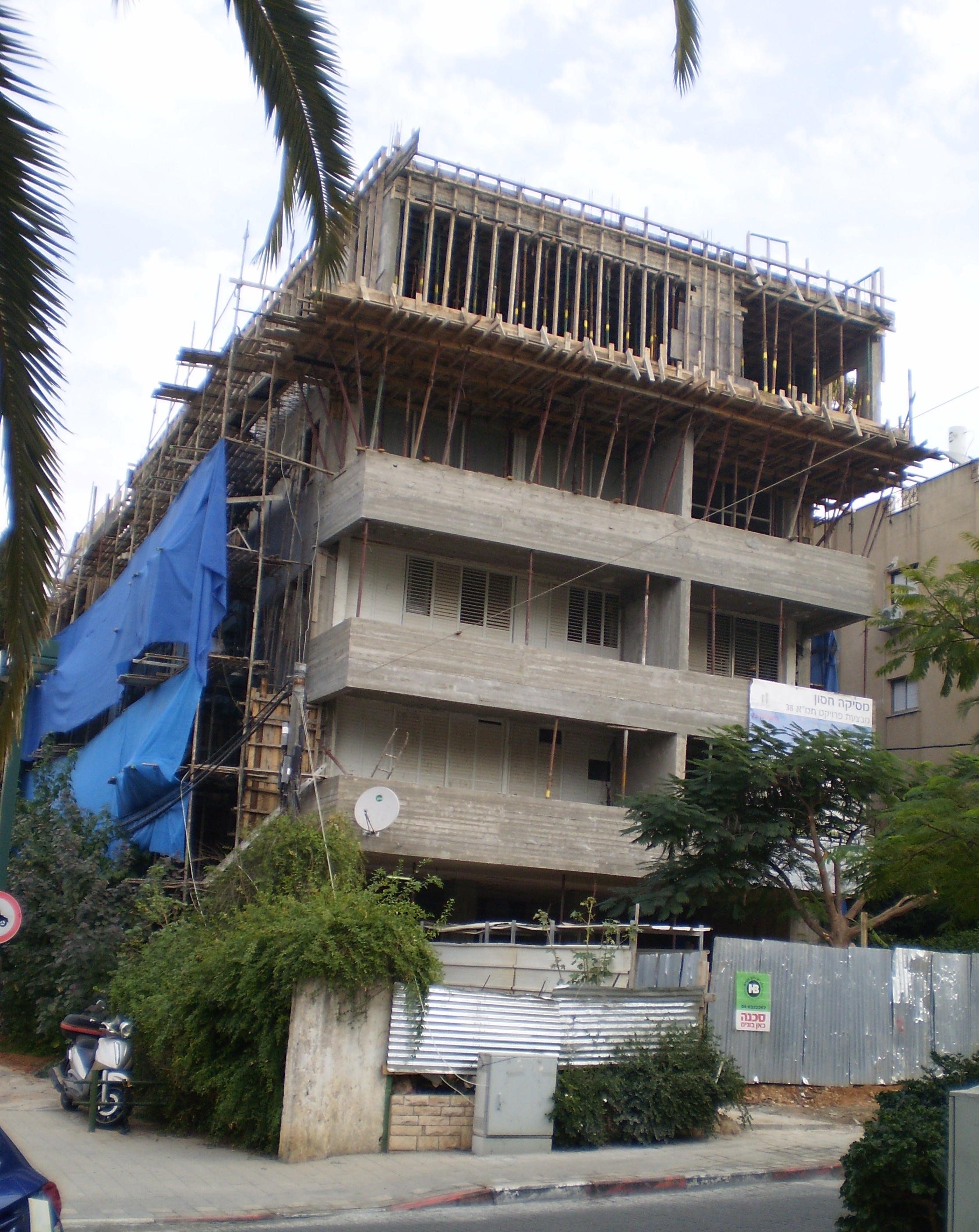 בניין במהלך שיפוץ תמ"א 38